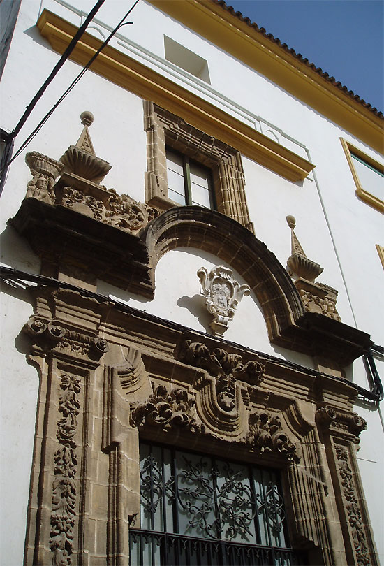 Portada de la calle San Bartolomé del Convento de Santo Domingo de El Puerto de Santa María, España. Ejemplo de la arquitectura barroca del XVII de la ciudad.